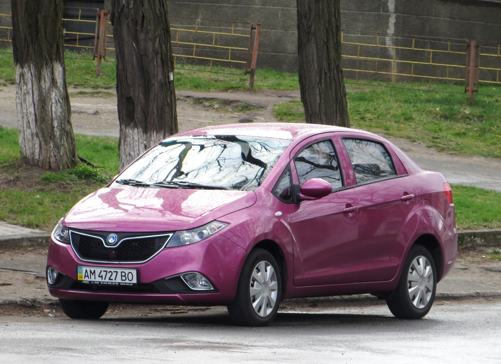 Geely GC5 sedan